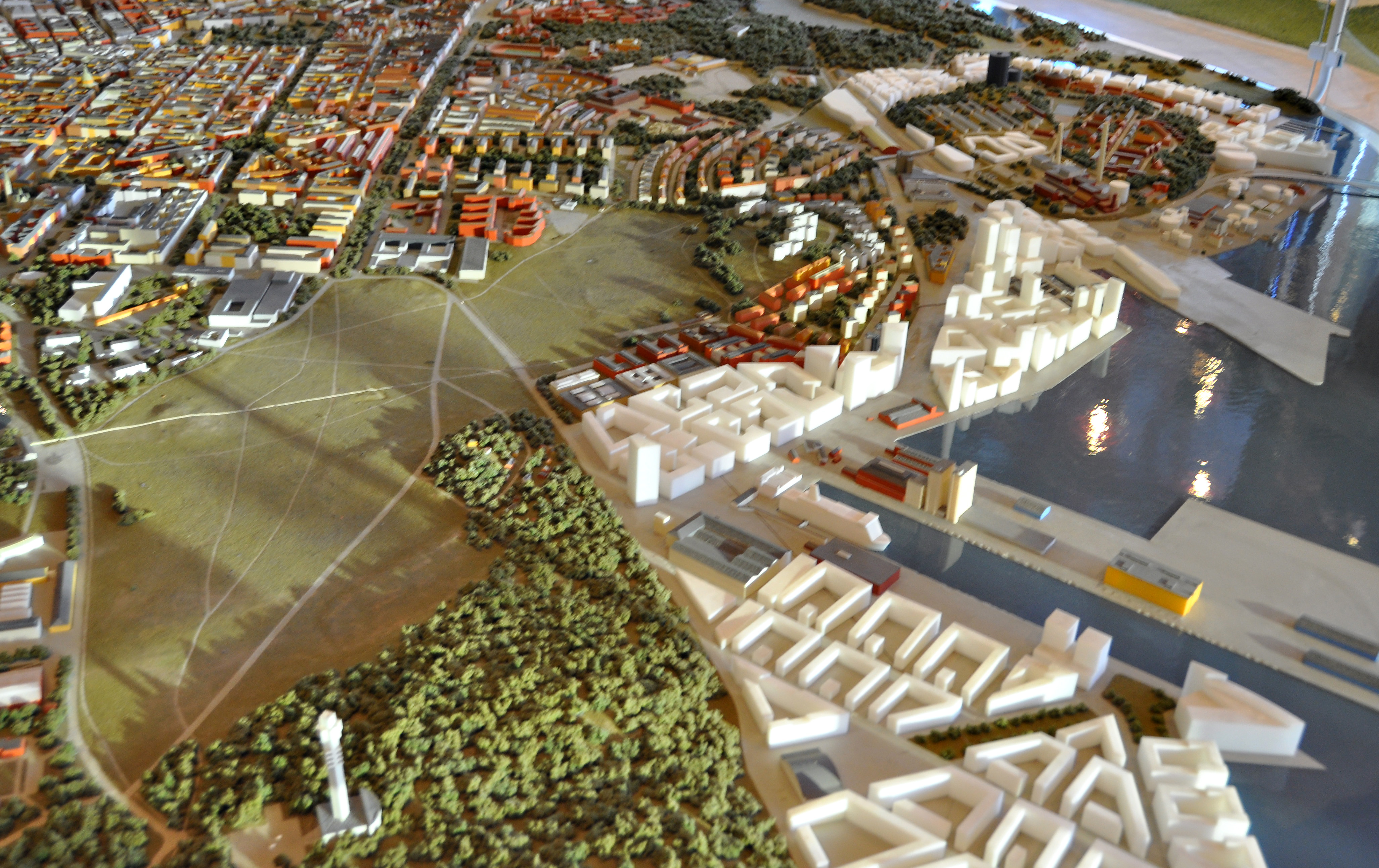 Norra Djurgårdsstaden, modell på Kulturhuset 2011